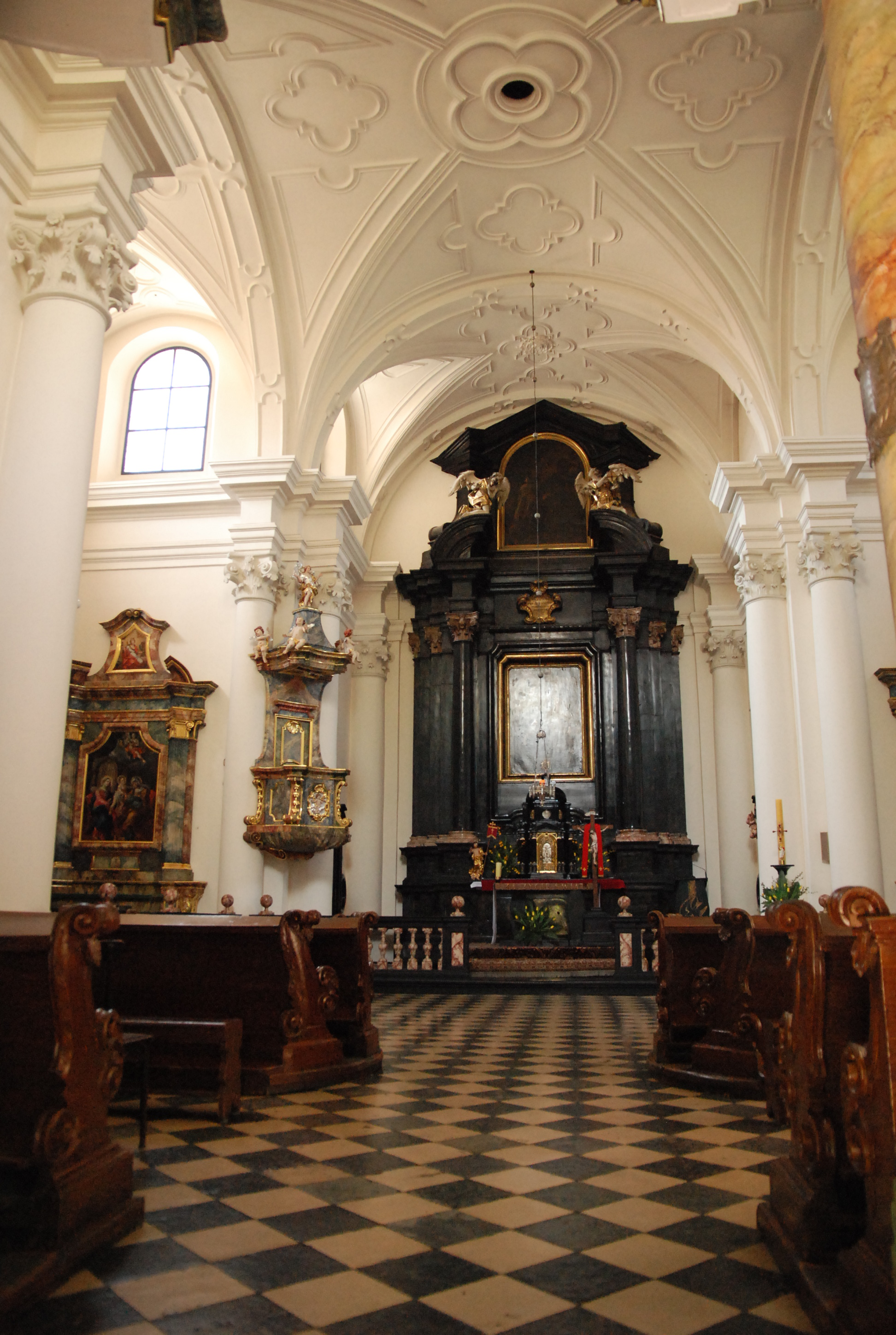 Kościół św. Teresy od Jezusa i św. Jana od Krzyża w Krakowie. Ul. Kopernika 44